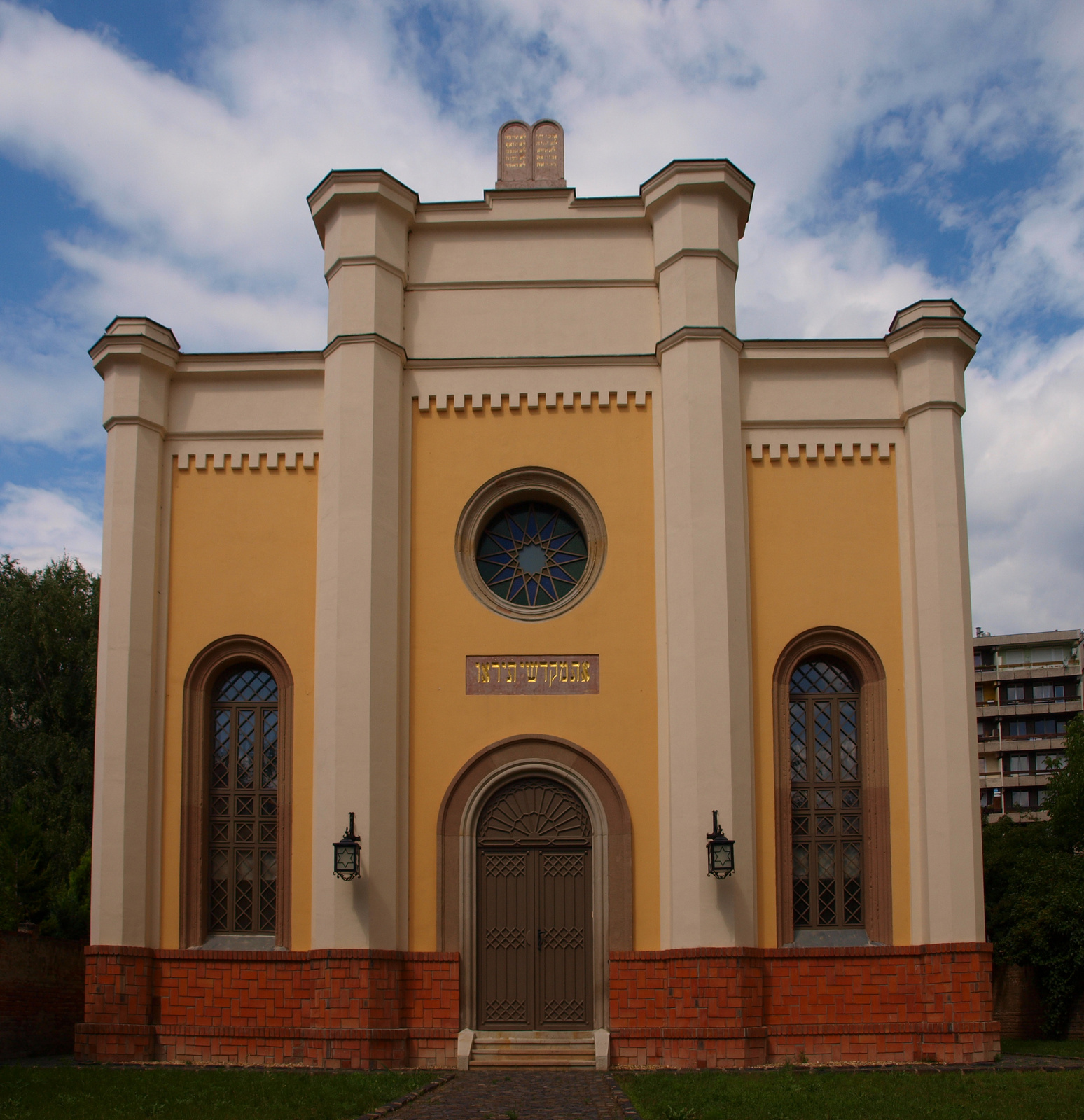 Zsinagóga Műemléki azonosító ID 7504 (törzsszám 9423). 1850-1880 közötti időszakban épült romantikus stílusban. - Vác, Csányi László dr. körút 9., Eötvös u. 3.) This is a photo of a monument in Hungary, Identifier: 7504